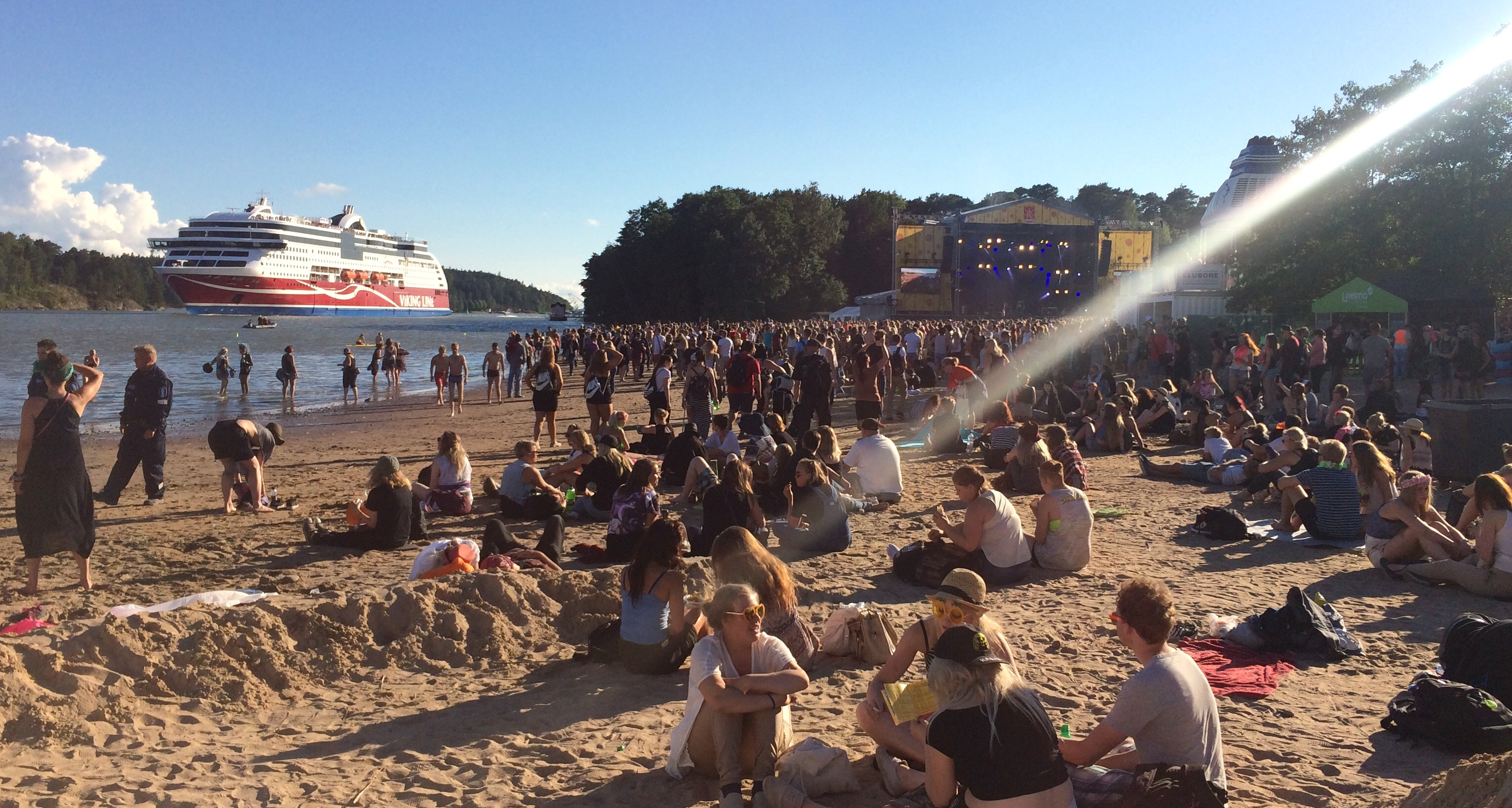 Rantalava in Ruisrock 2016.